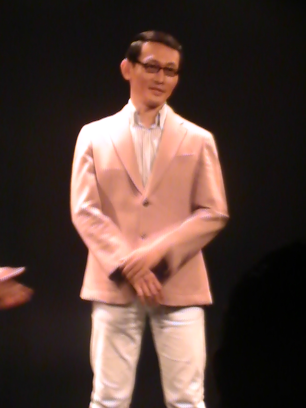 きくりん (2017年7月1日)